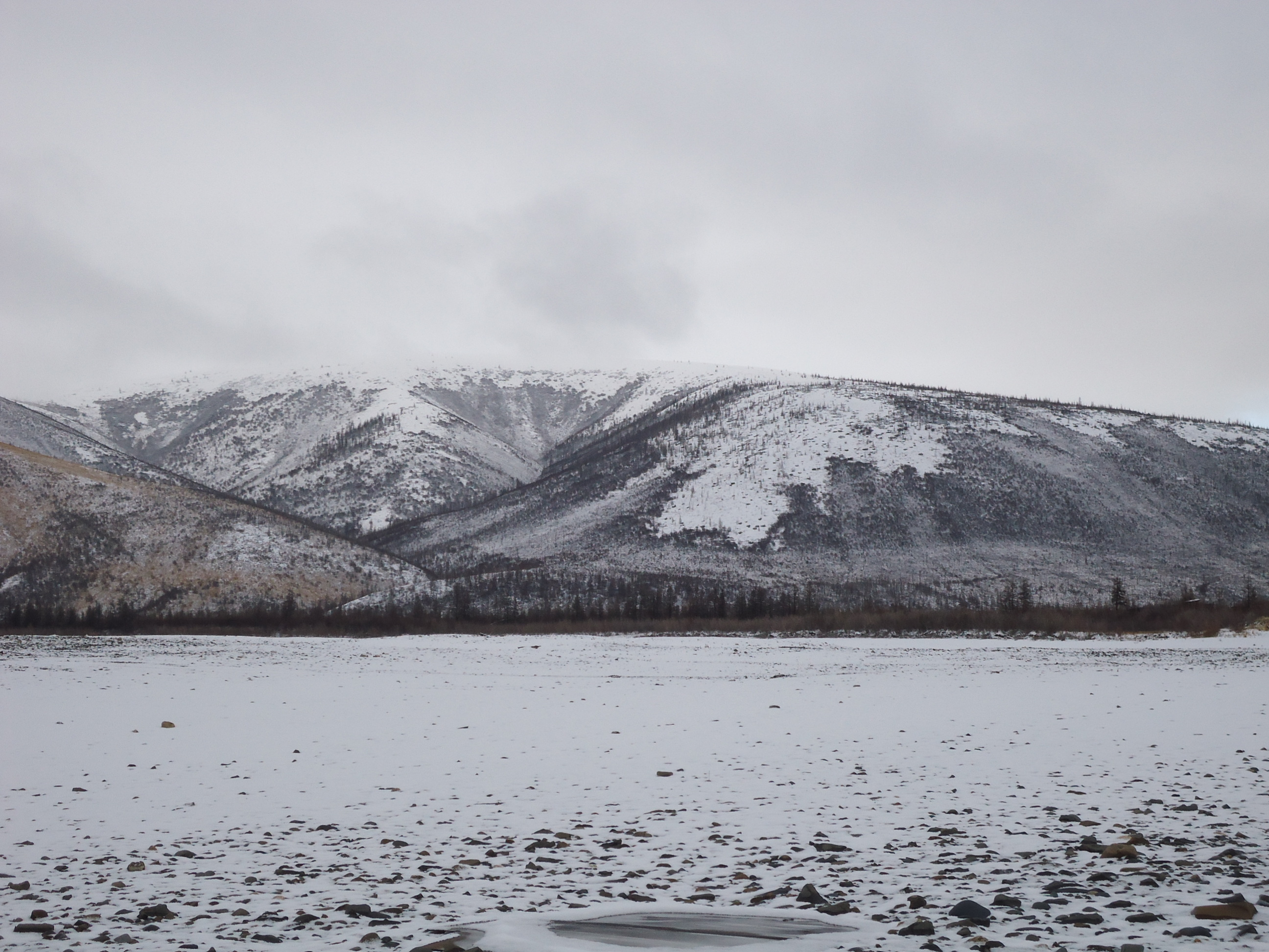 Конец навигации